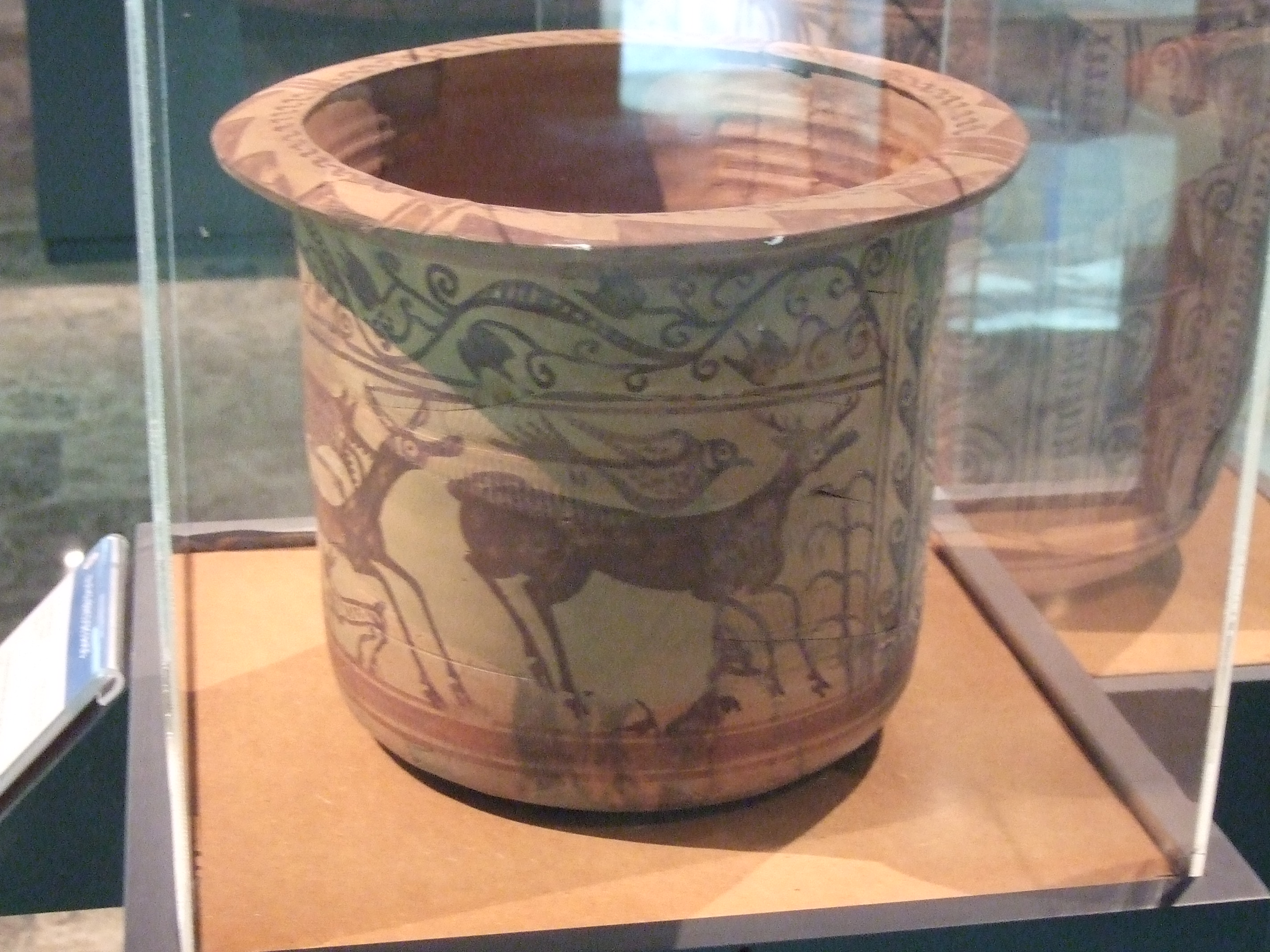 Kalathos ibérico decorado. Cueva del Cabuchico (Azuara, Zaragoza) Siglo I adC. Museo de Zaragoza